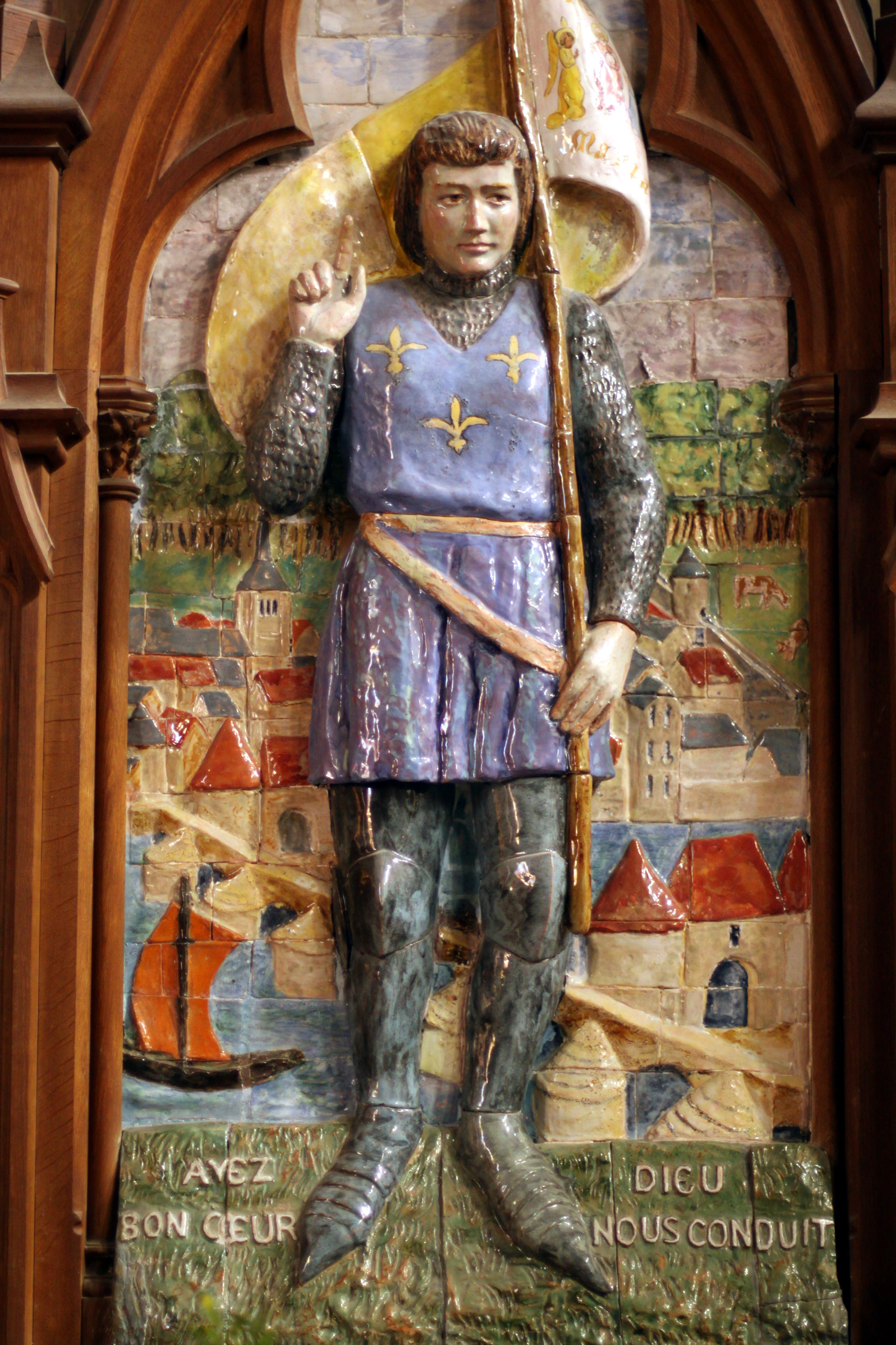 Photographie de la céramique représentant Janne d'Arc dans l'église de Jargeau (France - Loiret - 45)